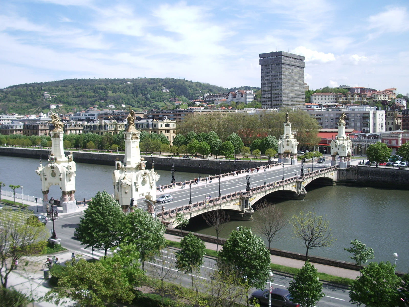 Maria Kristina zubia, Donostia